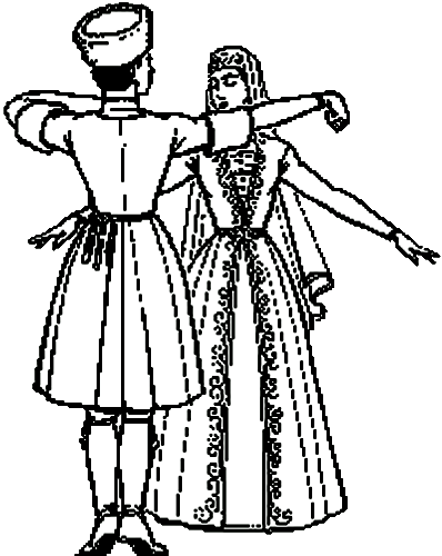 A Circassian couple dancing